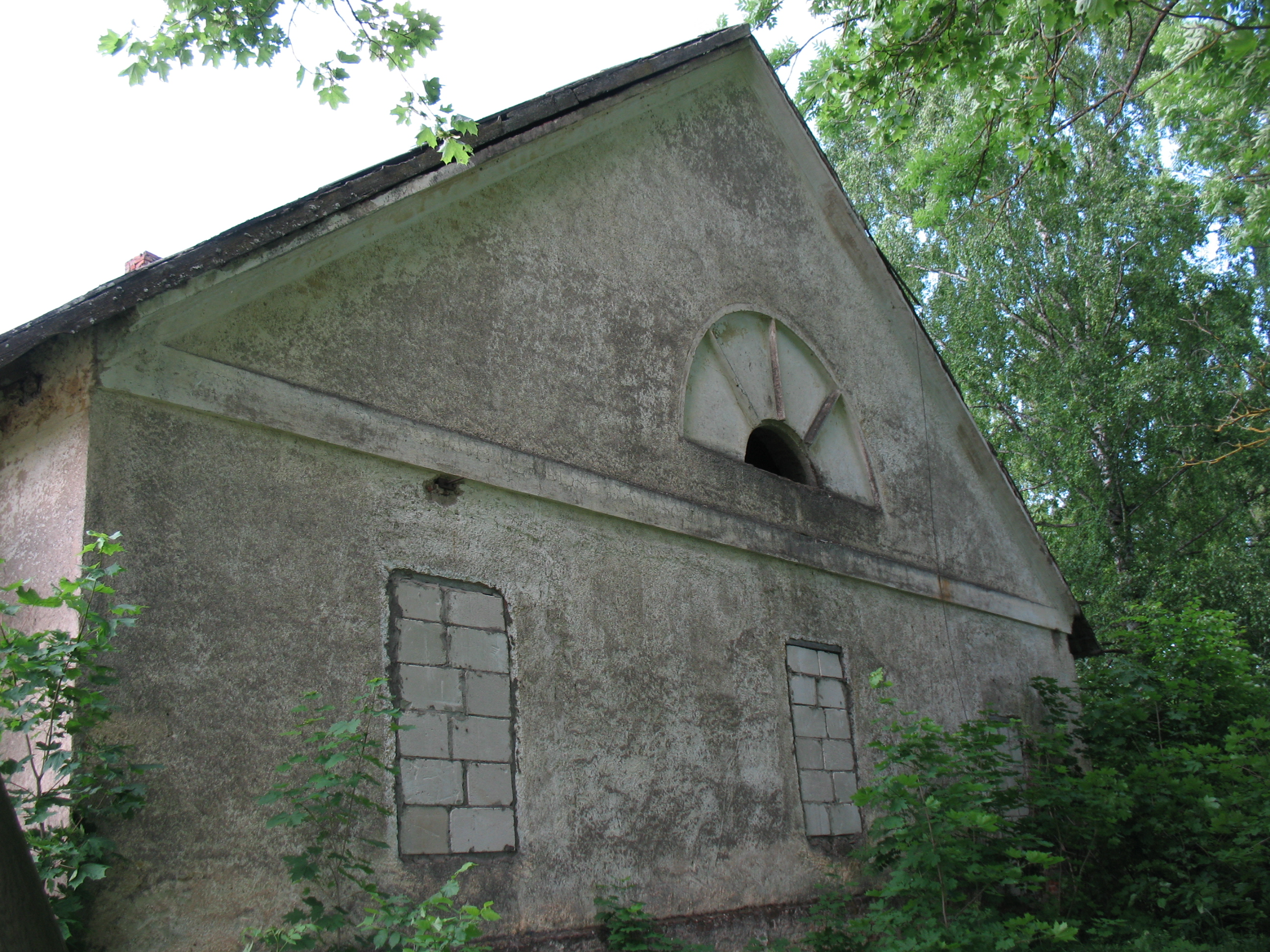 Tartu maakond, Rõngu vald, Valguta küla